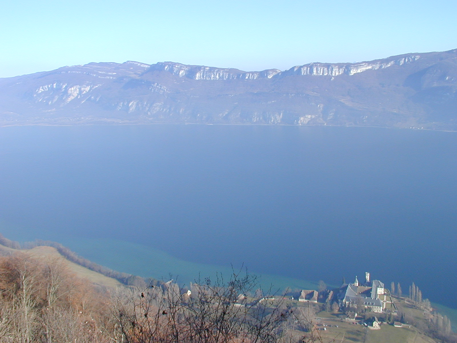 Lac du Bourget (quart nord) avec sur la rive au fond les falaises de Chindrieux et la montagne de Cessens; en bas, à droite, l'Abbaye royale de Hautecombe. Photographie prise par Semnoz en janvier 2005. Semnoz, January 2005.